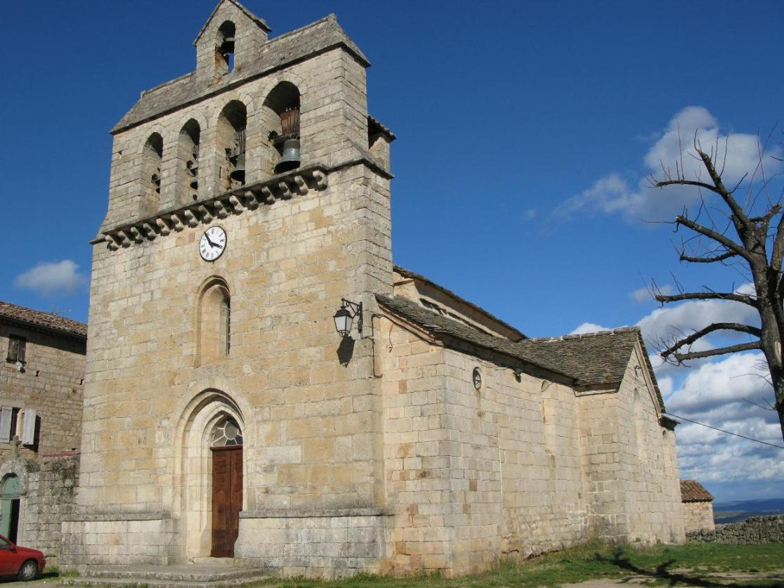 Village de Payzac (Ardèche)